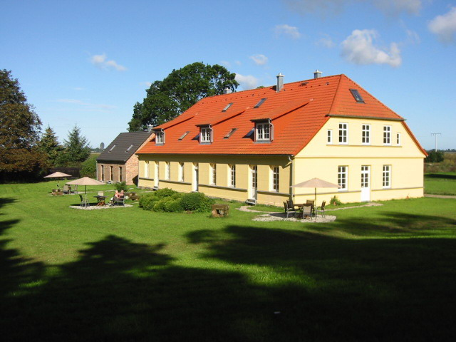 Gut Rattelvitz Rügen